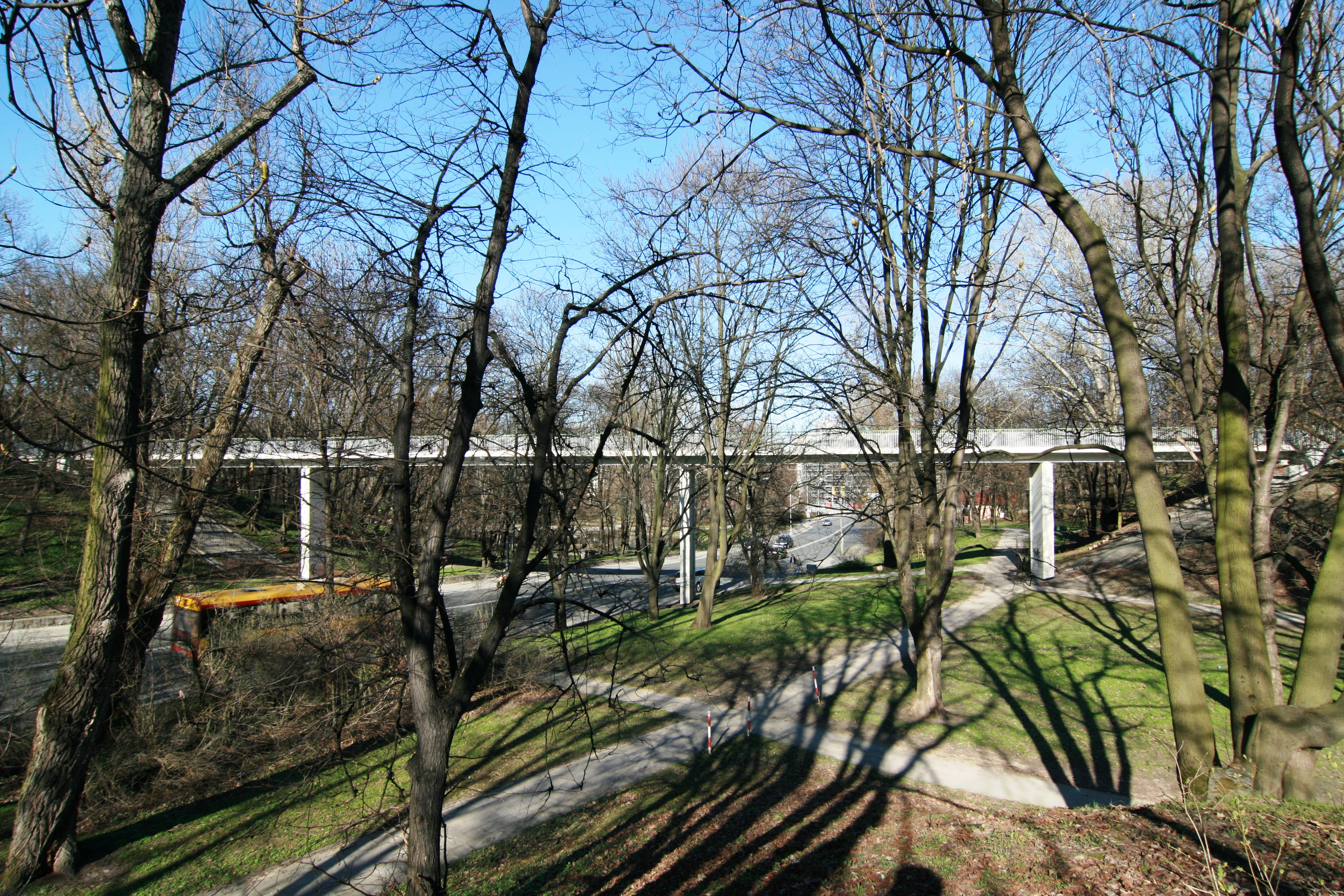 Kładka Miłości nad ul. Książęcą w Warszawie